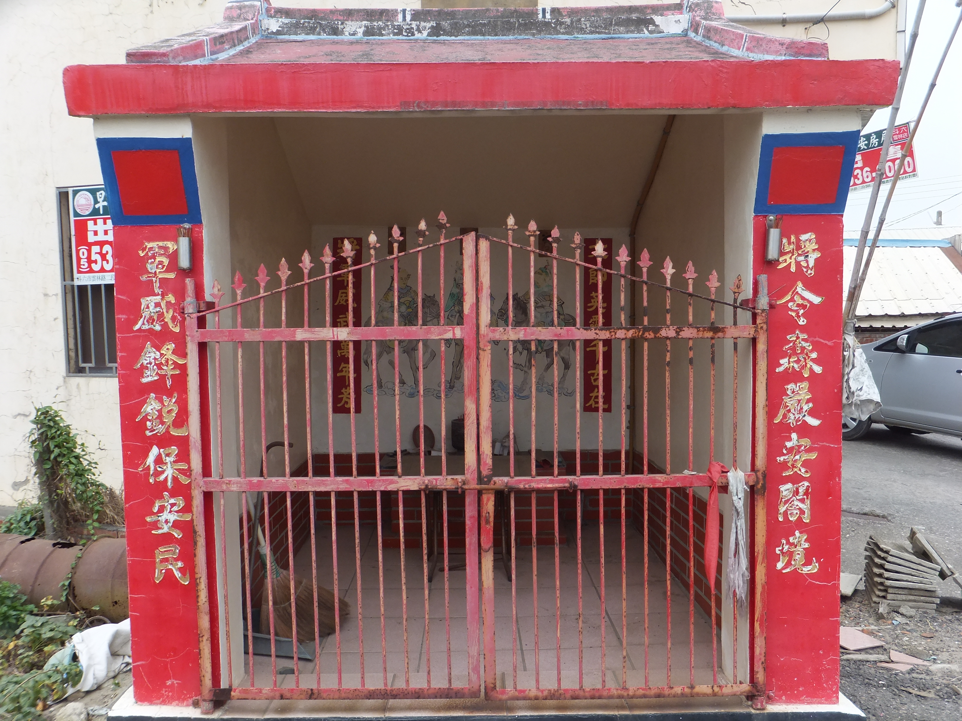 中文（台灣）: 台灣嘉義縣溪口鄉柴林腳的五營神將-西營